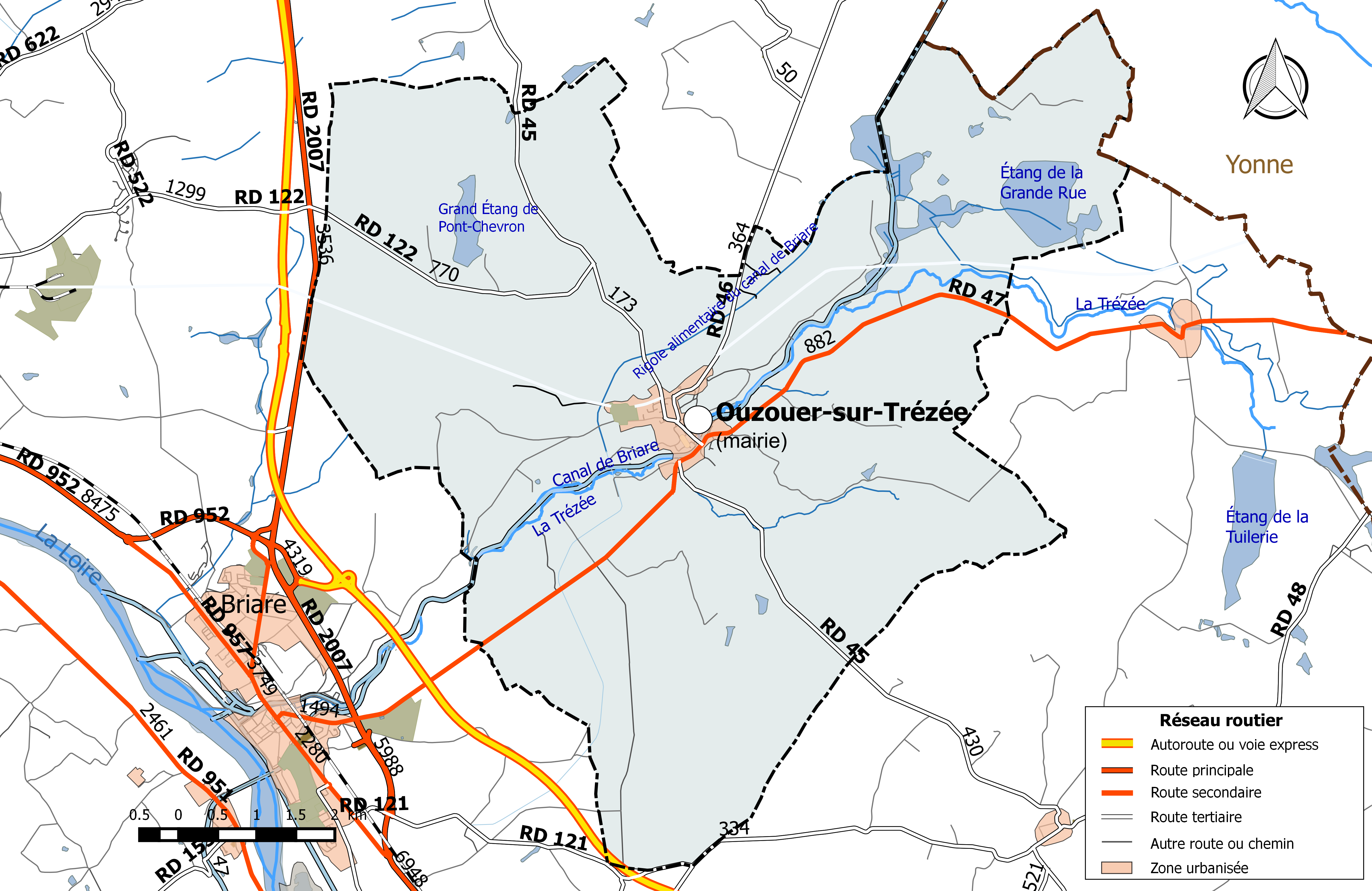 Carte du réseau routier de la commune de Ouzouer-sur-Trézée.